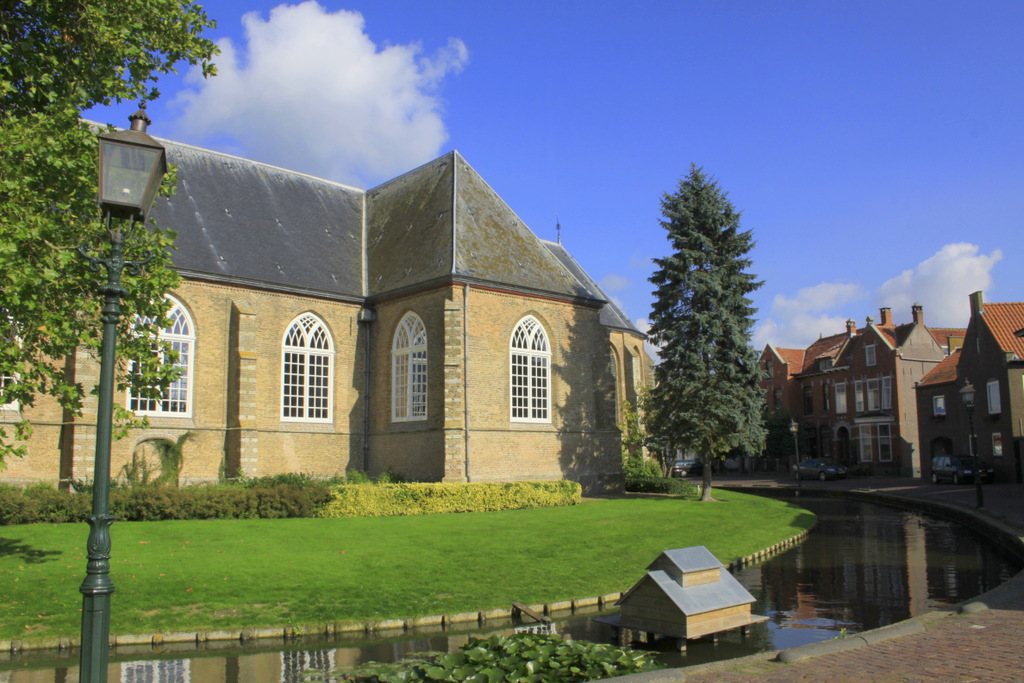 Bijzonder is de ringgracht om de kerk, NieuwTonge is dan ook een Ringdorp, zoals op meer plaatsen .